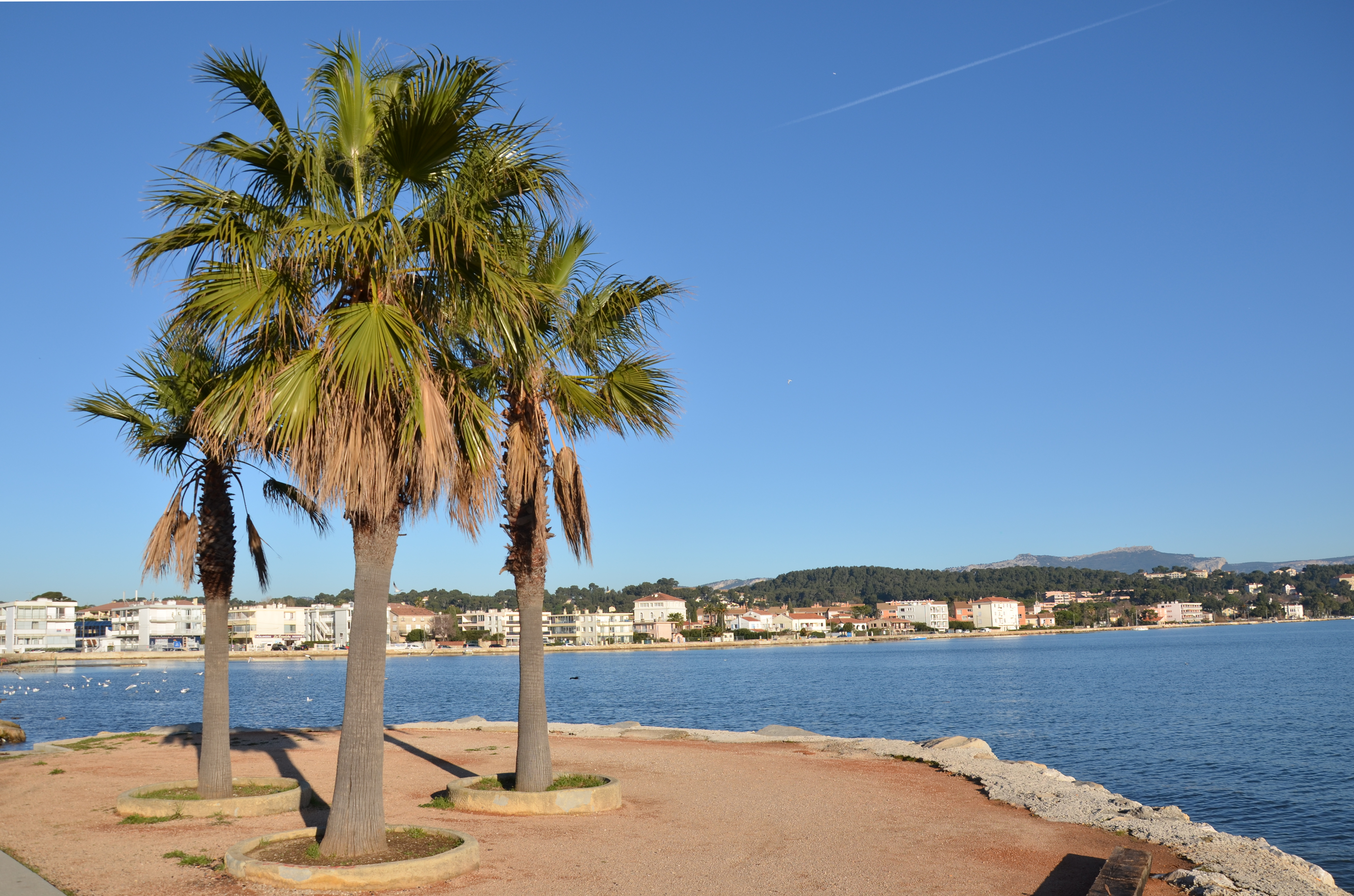 Vue sur la Corniche de Tamaris depuis les Sablettes. Ville de La Seyne-sur-Mer